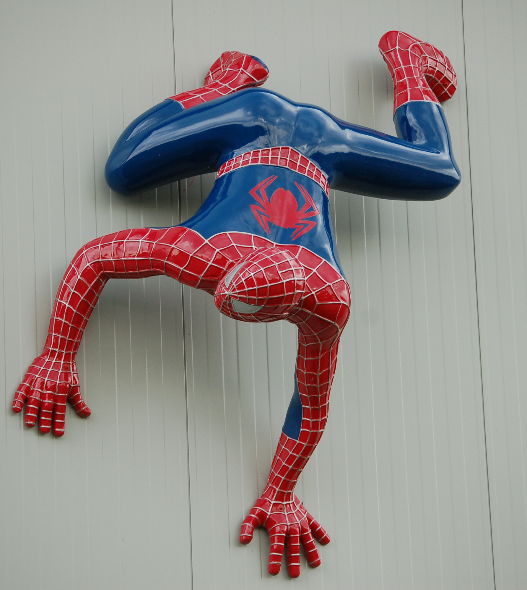 Spider-Man in Aktion. Figur an einer Hallenwand in Tornesch